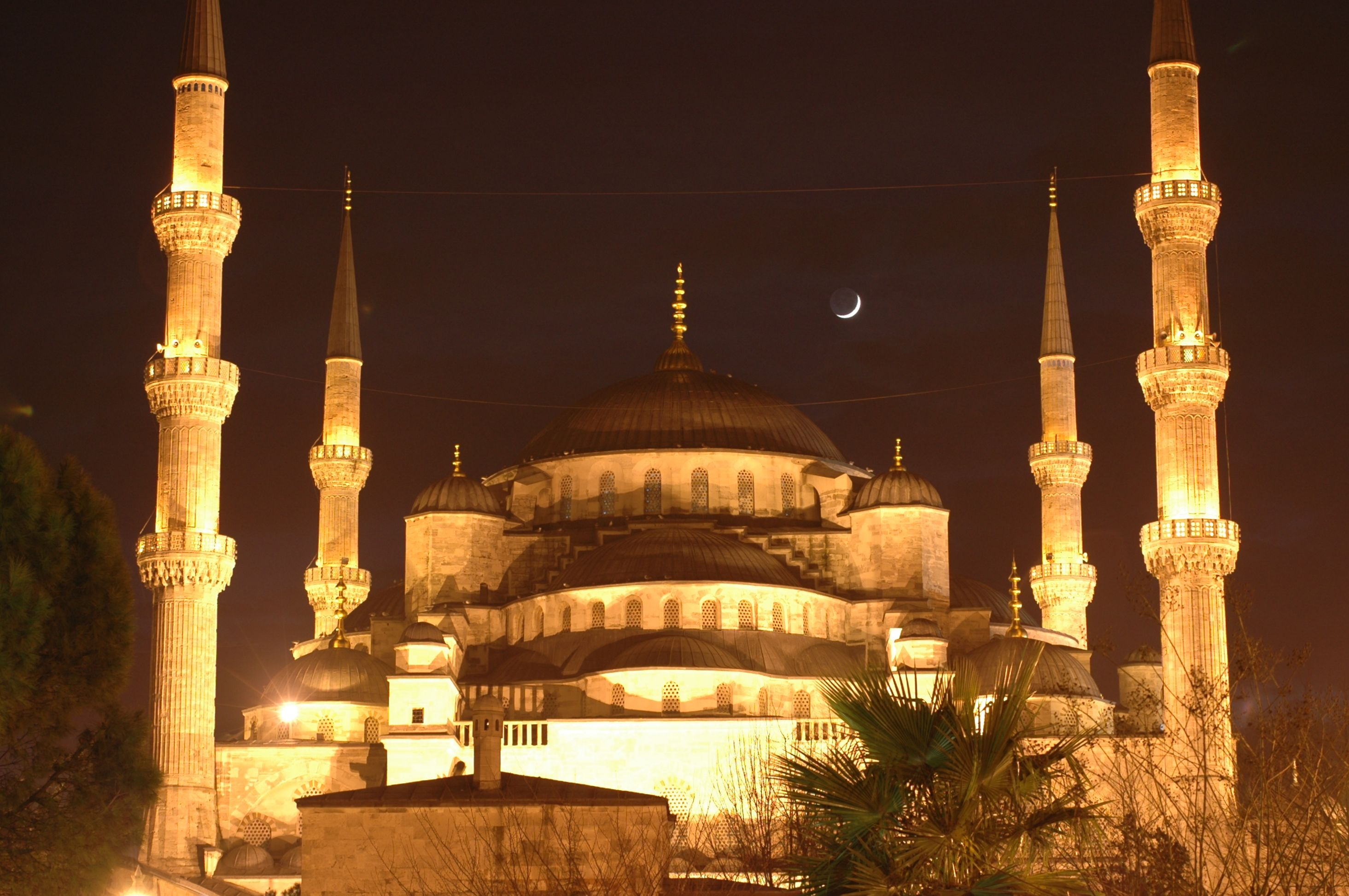 Istanbul - Mesquita blava